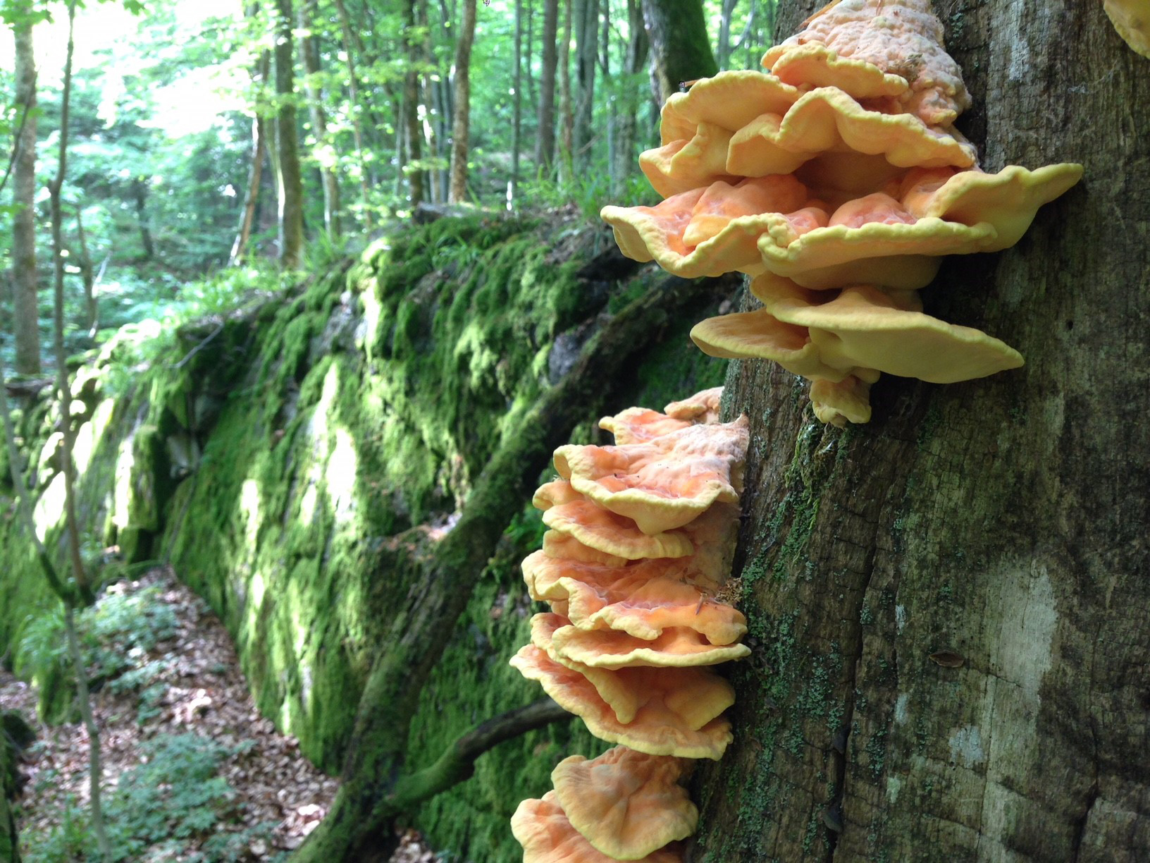 Svovelkjuke i Brånakollane naturreservat.